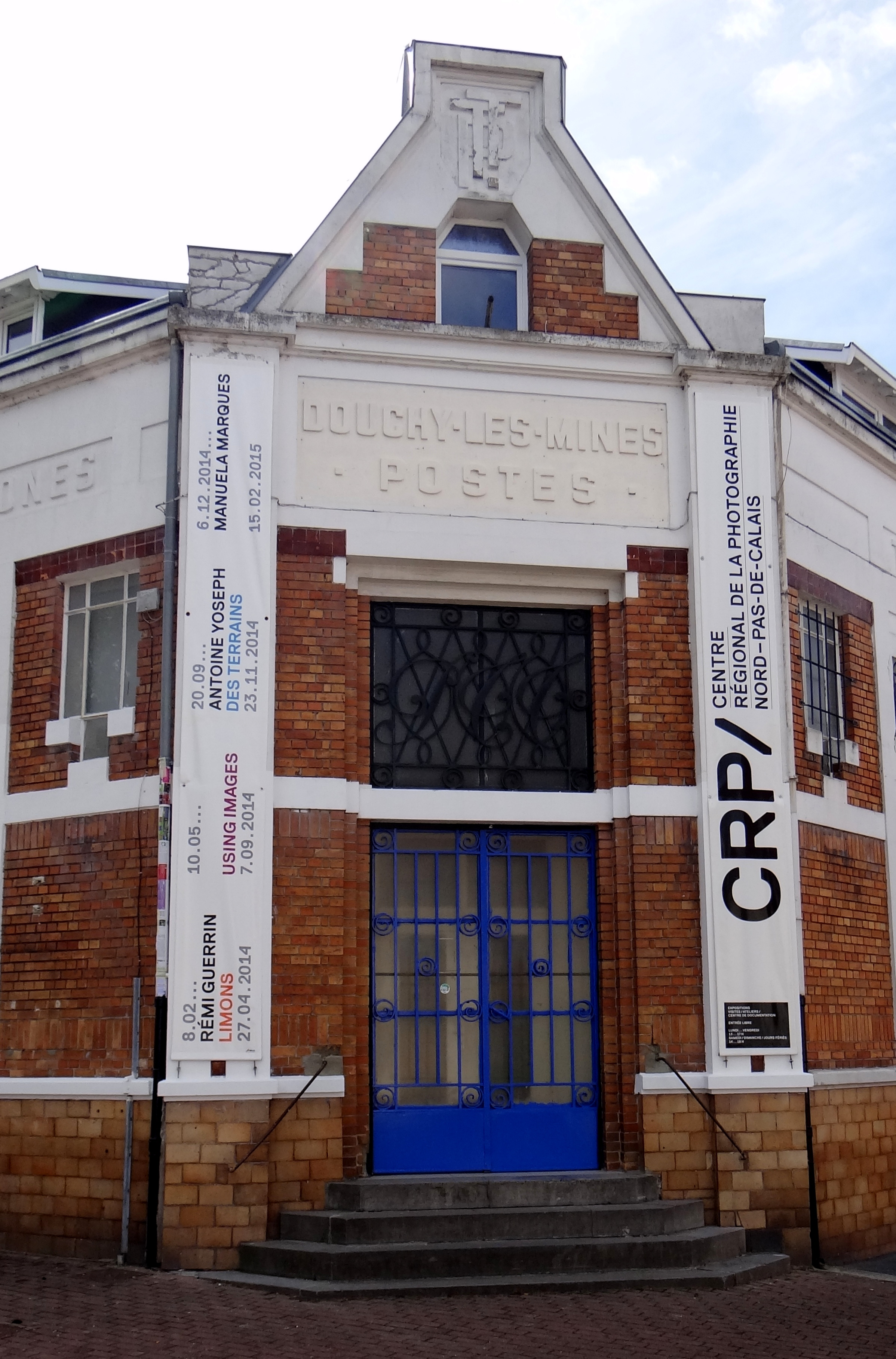 Centre régional de la photographie du Nord Pas-de-Calais -Façade